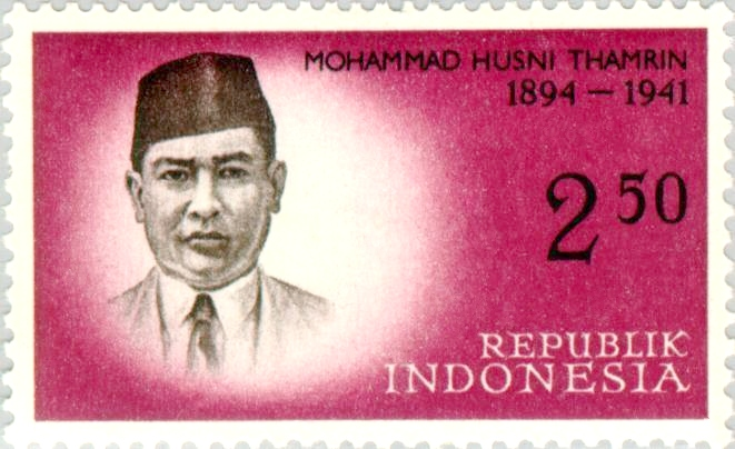 Mohammad Husni Thamrin